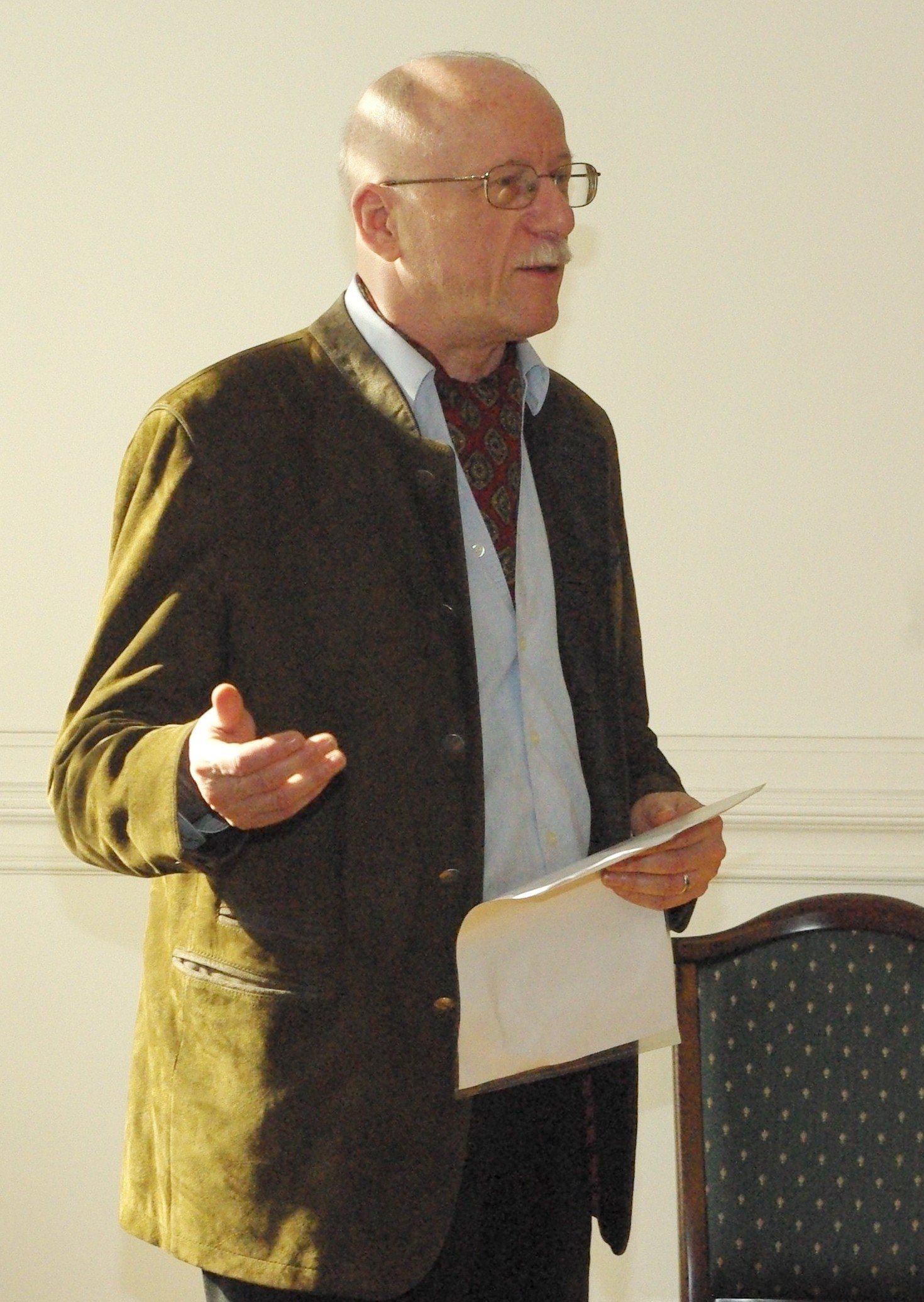 Szabó G. Zoltán (Győr, 1943. április 9. — 2018. október 27.) irodalomtörténész, kritikus